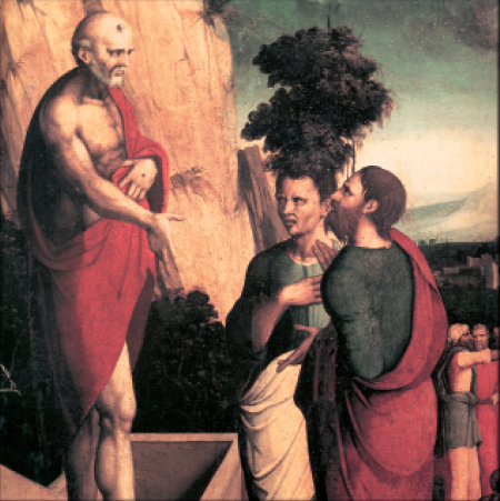 San Pedro elizako erretaulako xehetasunak, Itsaso